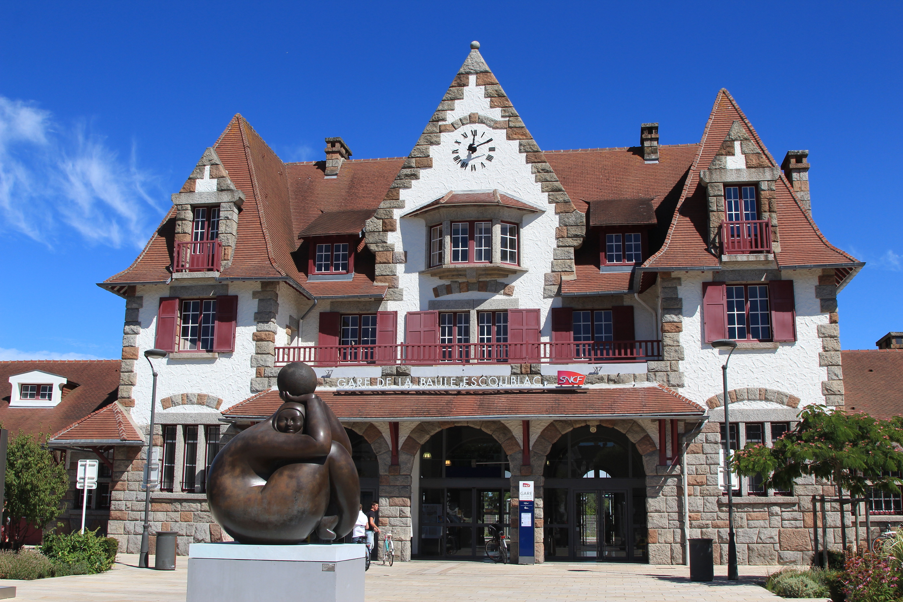 Le bâtiment-voyageurs de la gare de La Baule-Escoublac vu côté parvis.